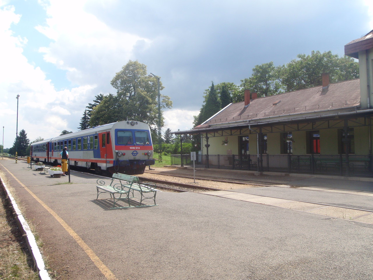 Jenbacher Kőszeg állomáson